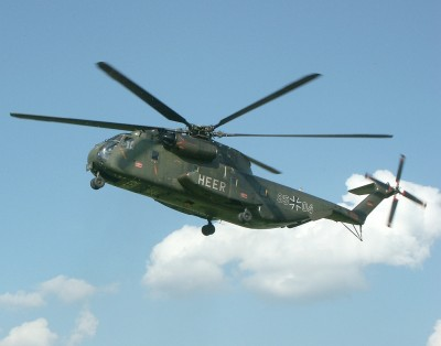 Sikorsky CH-53 (Original text: Sikorsky CH-53 im Landeanflug)